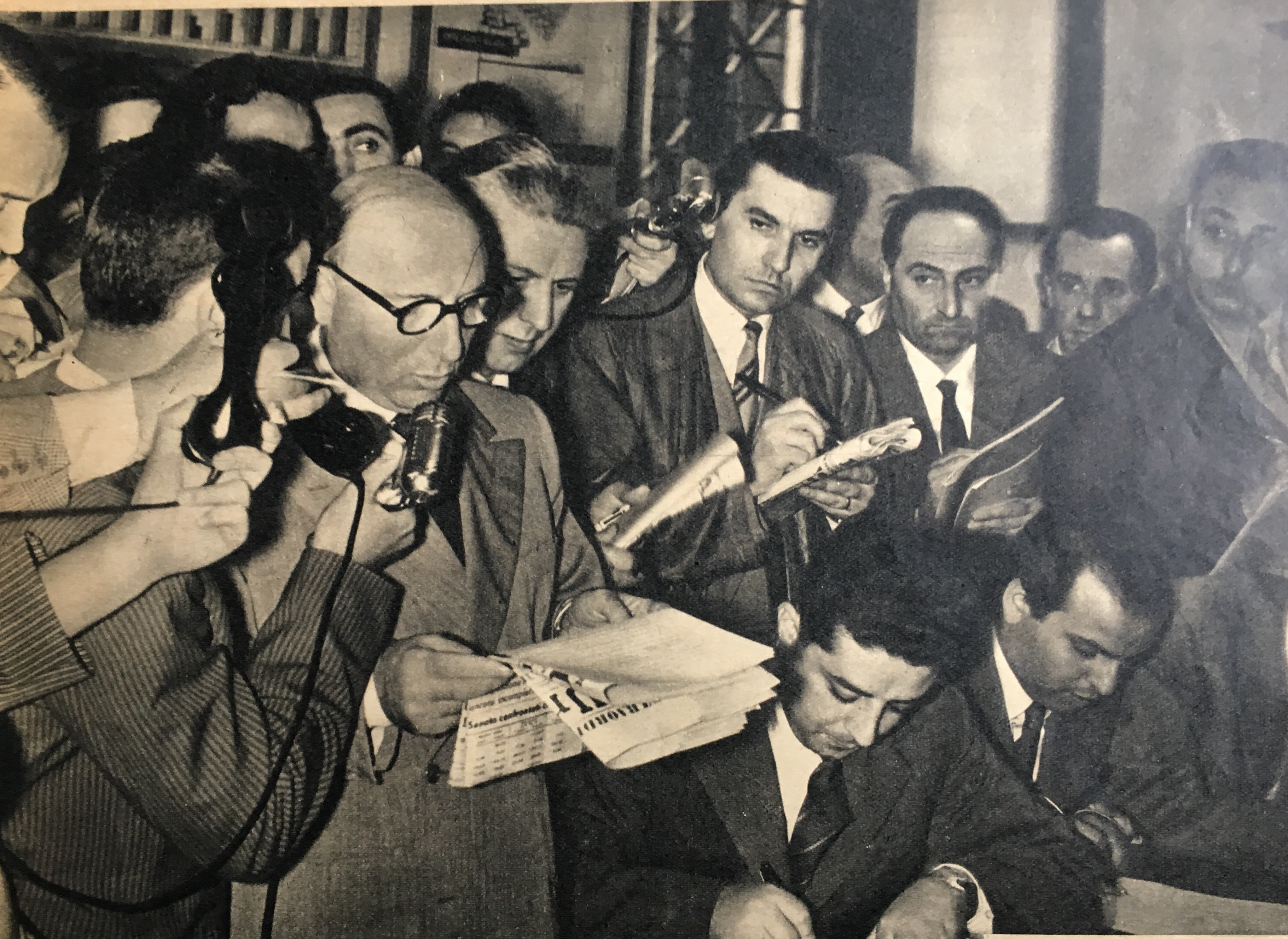 Mario Scelba comunica i risultati delle elezioni 1953